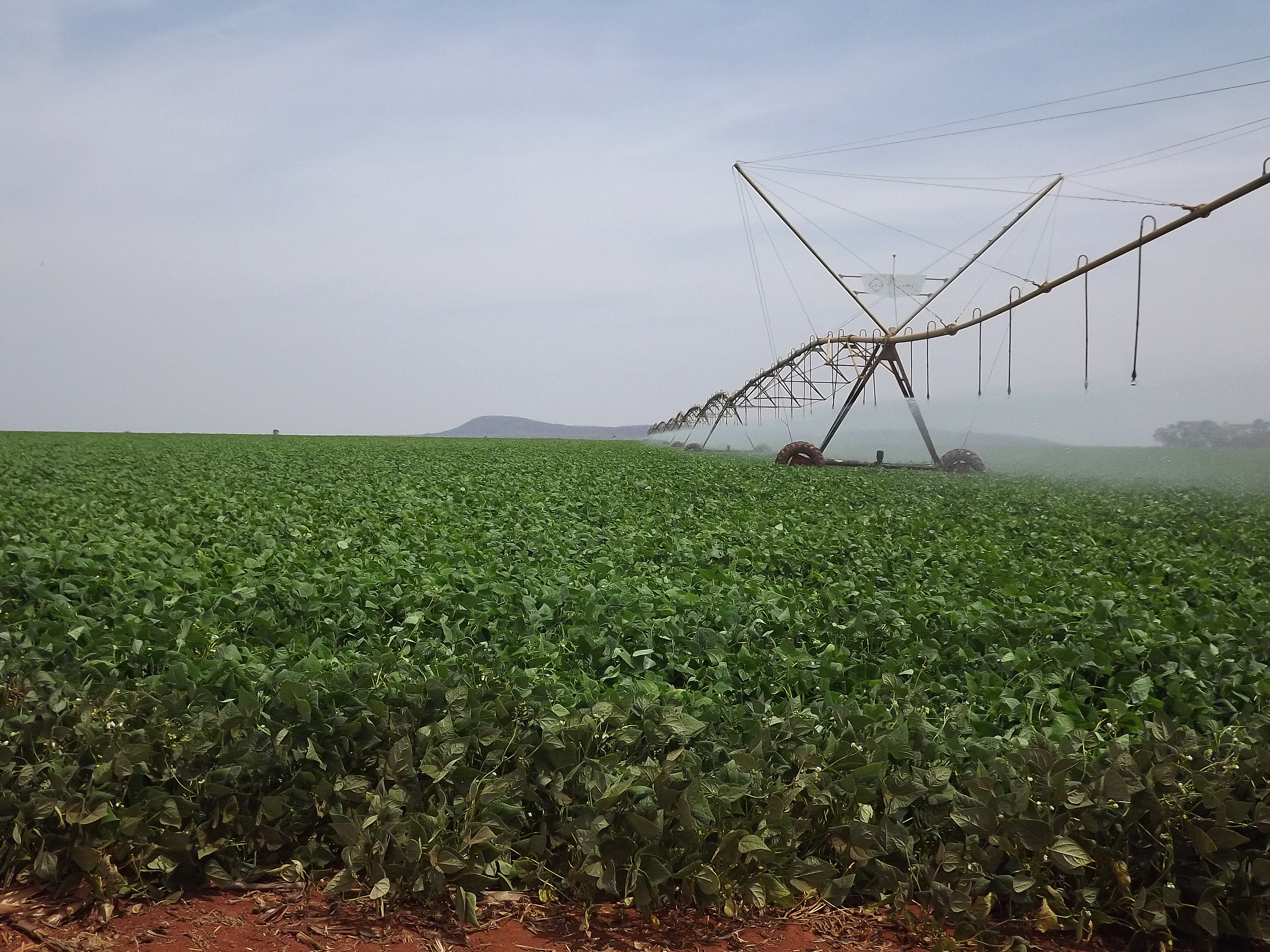 Lavoura de feijão (Phaseolus vulgaris) irrigado na Fazenda PCPER Lote 80 Proprietário Ezimar.